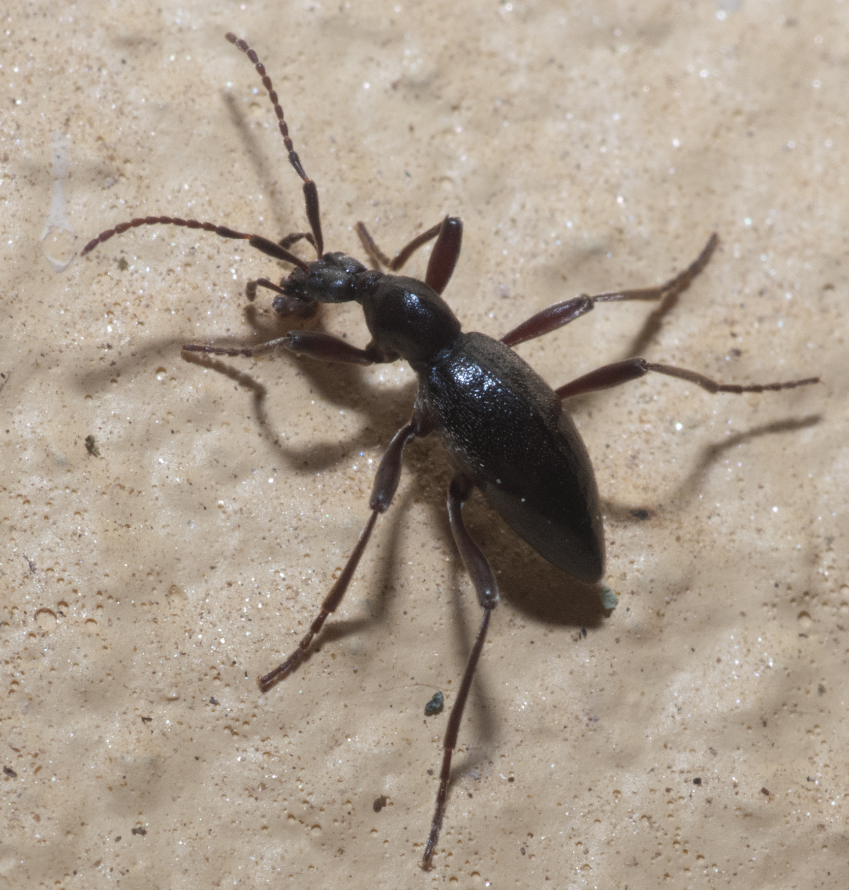 Escaravello, Oroso, Galiza